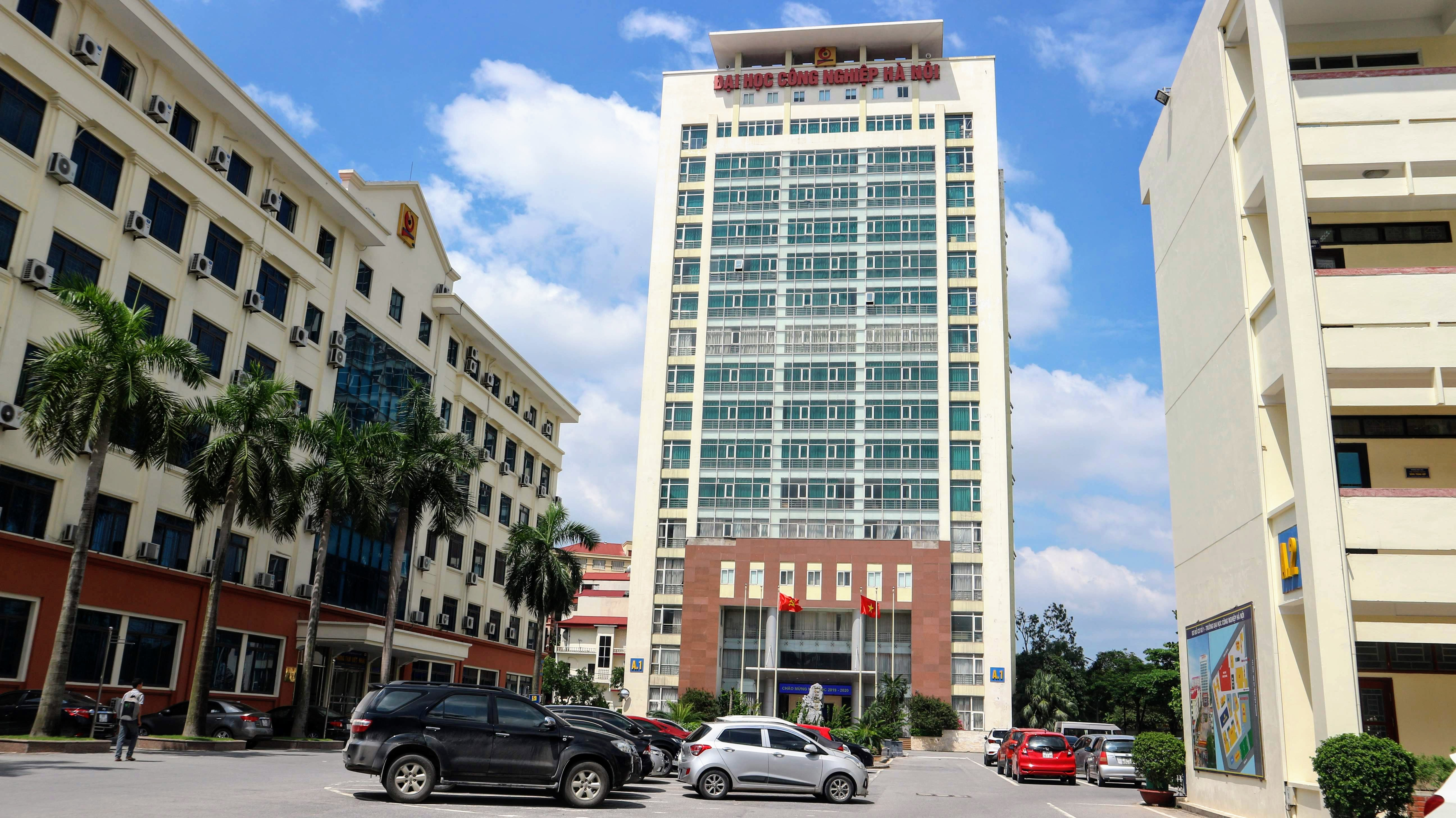 Bức ảnh chụp bởi Huynh ICT